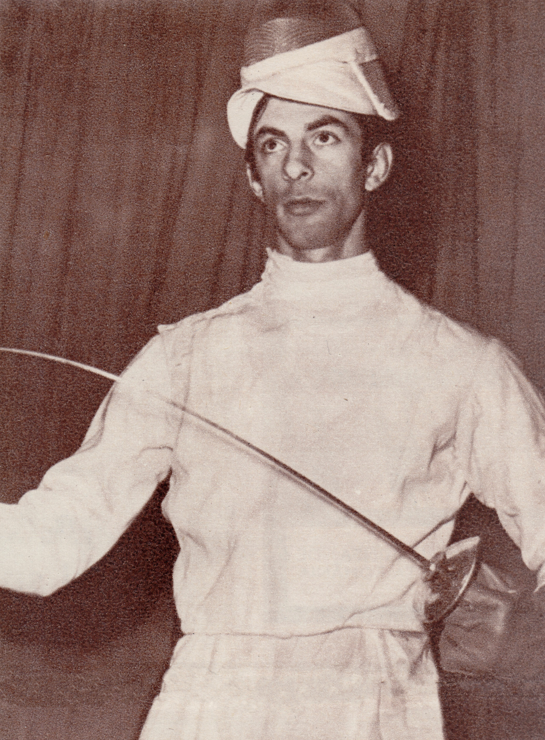 Ion Drîmbă